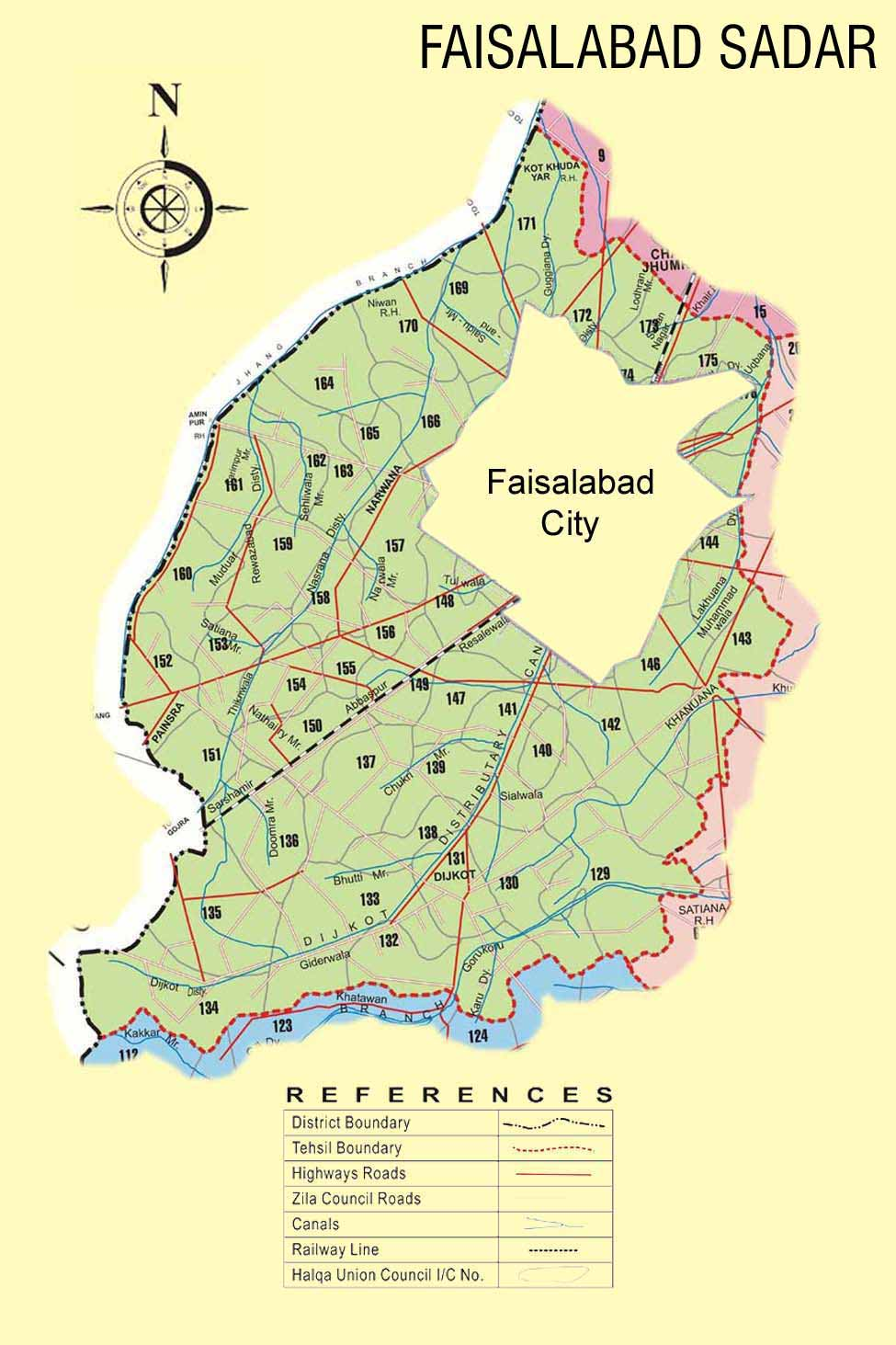 پنجابی: تحصیل فیصل آباد صدر دے پنڈ